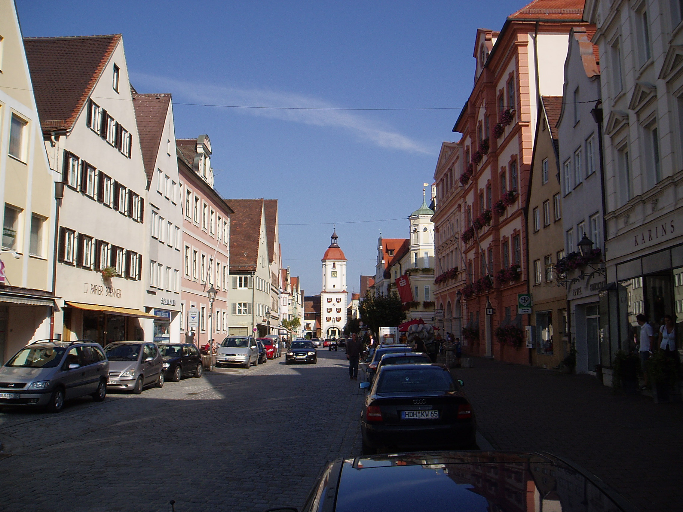 Königstraße in Dillingen a.d.Donau mit Blick auf das östliche Stadttor